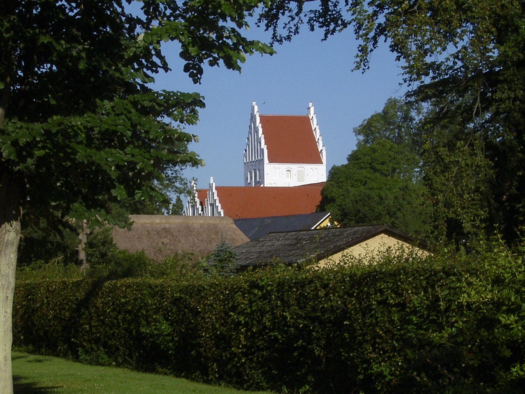 Hårby Kirke fra præstegården på Møllevej 17. Taget sommer 2004.